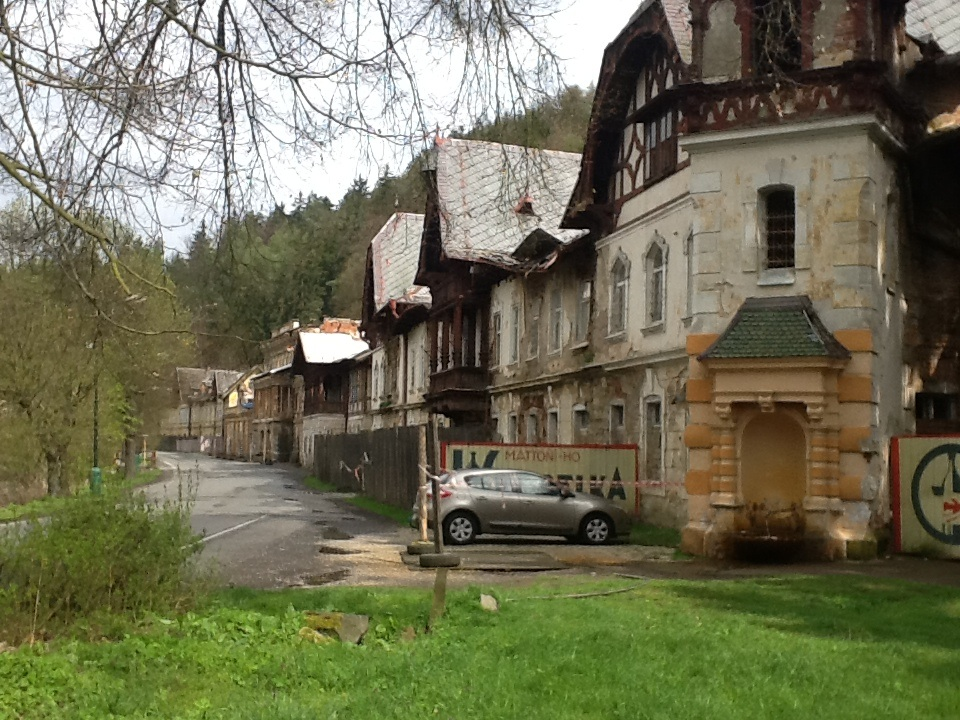 První lázeňský dům Kyselka 2014